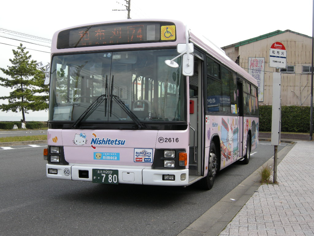 和布刈にて撮影